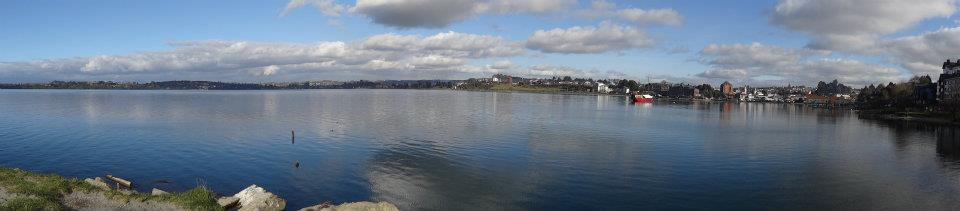 imagen panorámica